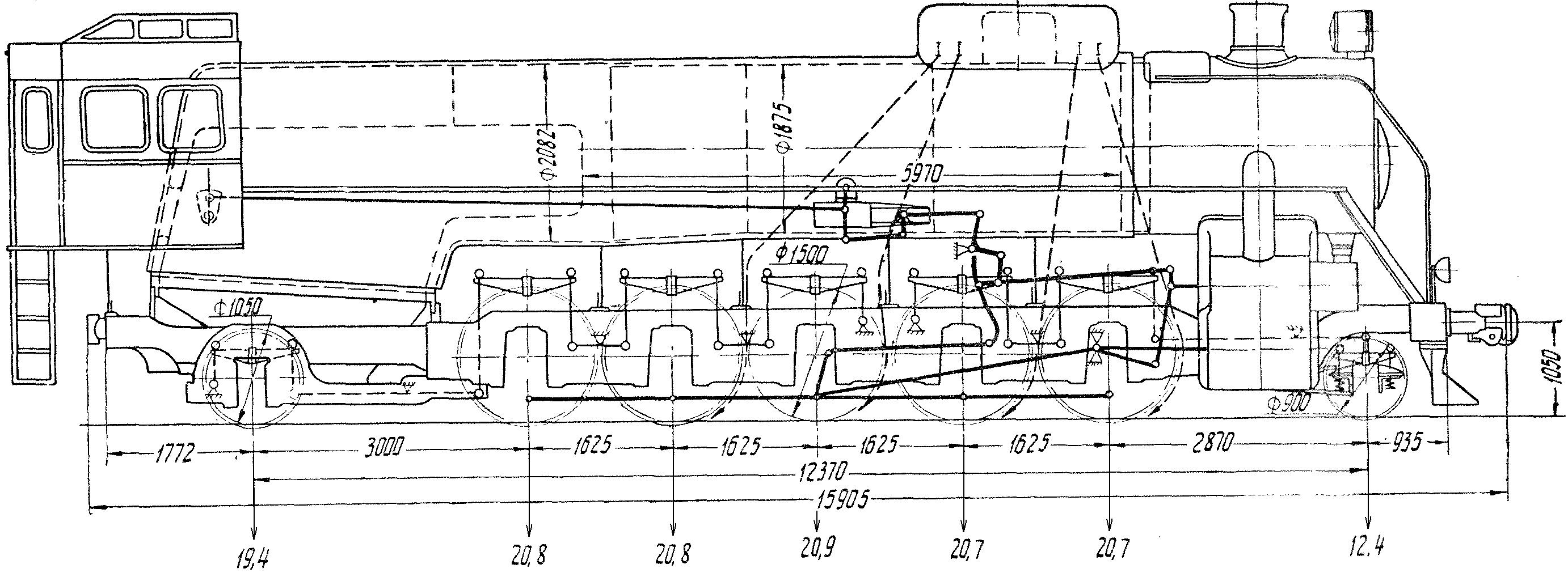 Основные размеры паровоза ФД21